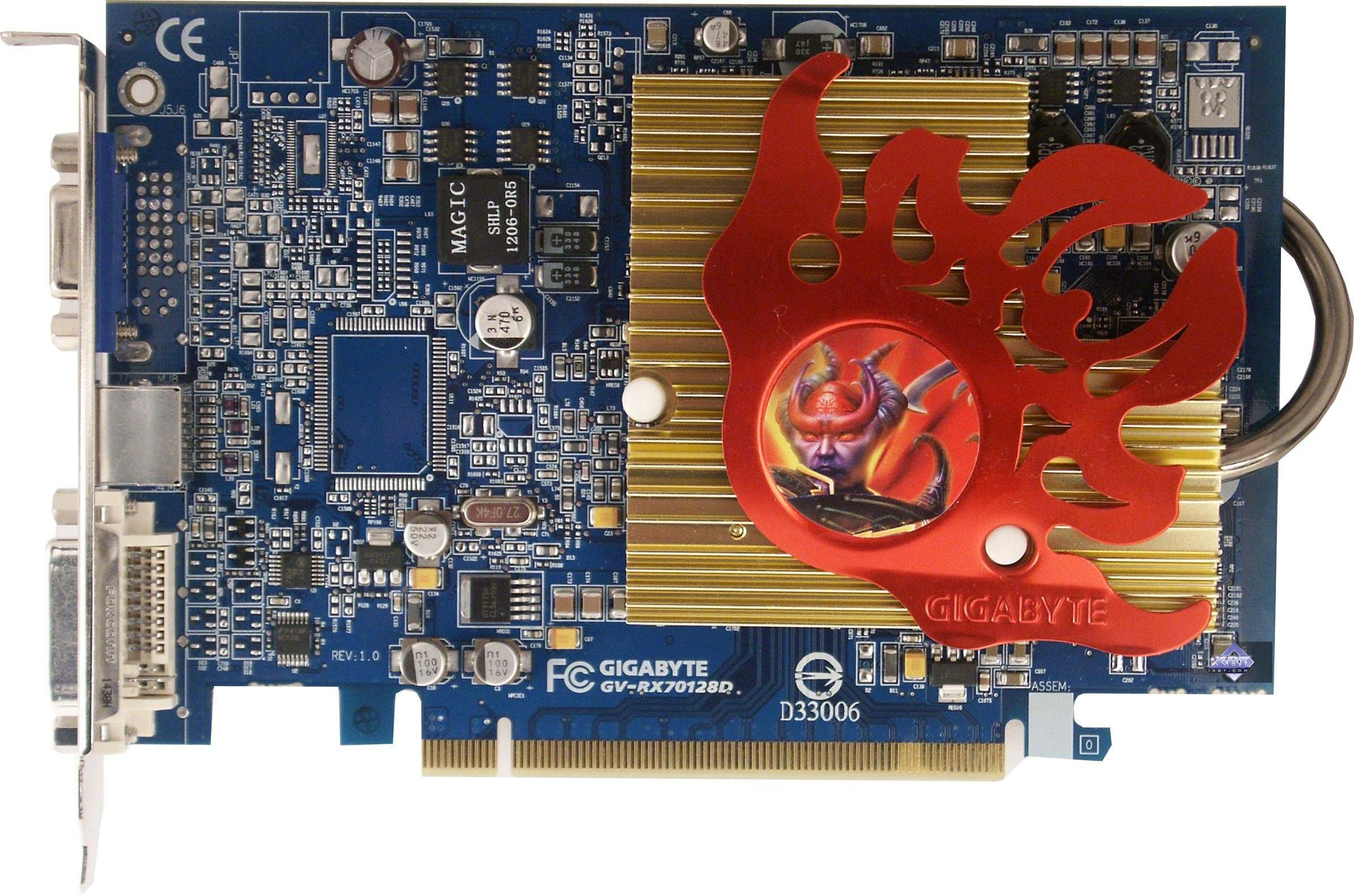 Gigabyte X700 Pro